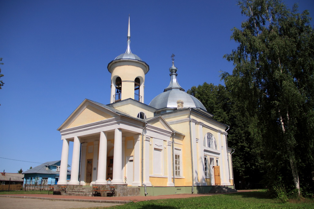 Усадьба Бренчаниновых (санаторий «Октябрьские всходы») (Вологодская область, Грязовец, село Покровское (Лихтошский сельсовет))